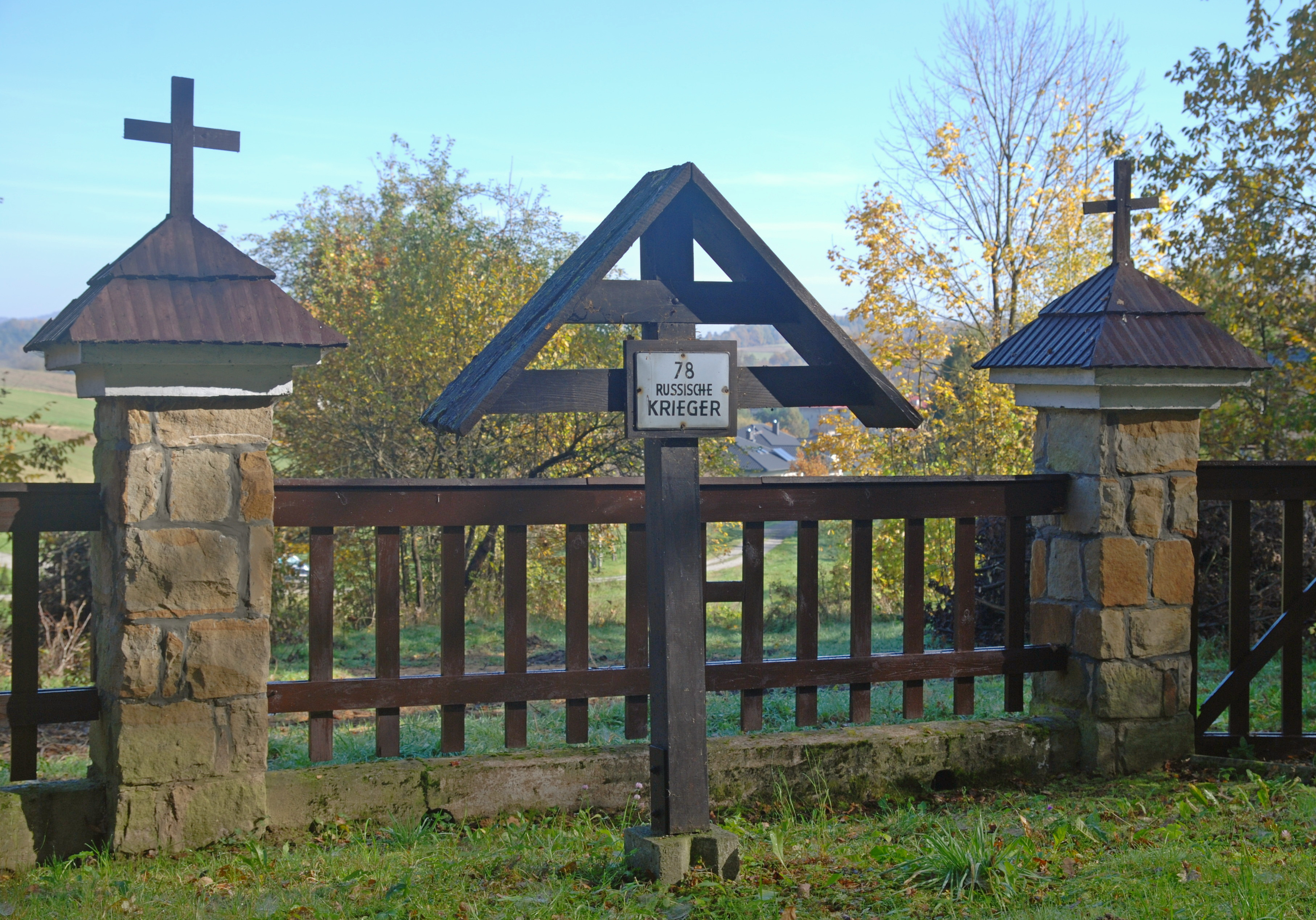 wieś Święcany